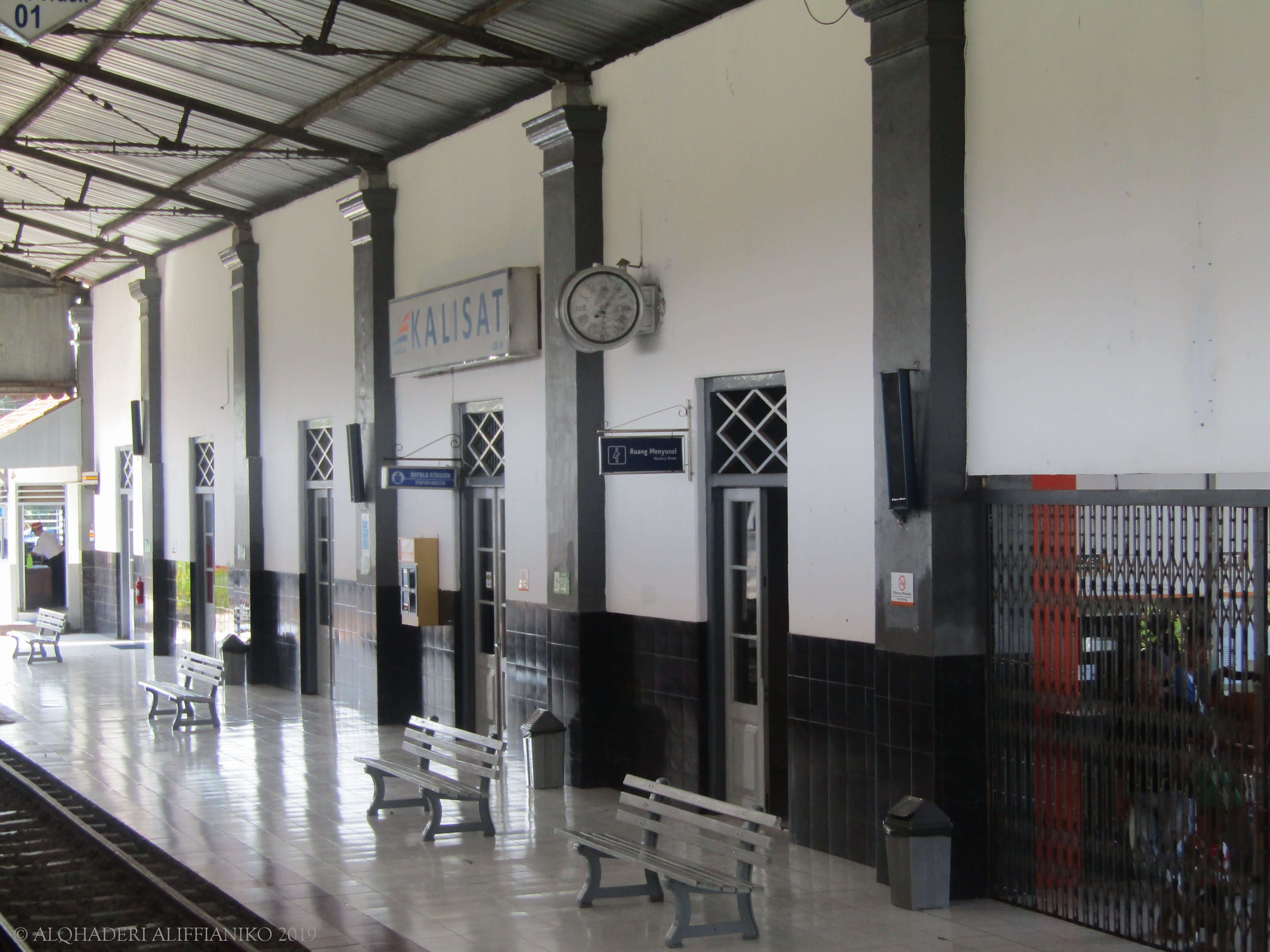 Bagian dalam Stasiun Kalisat